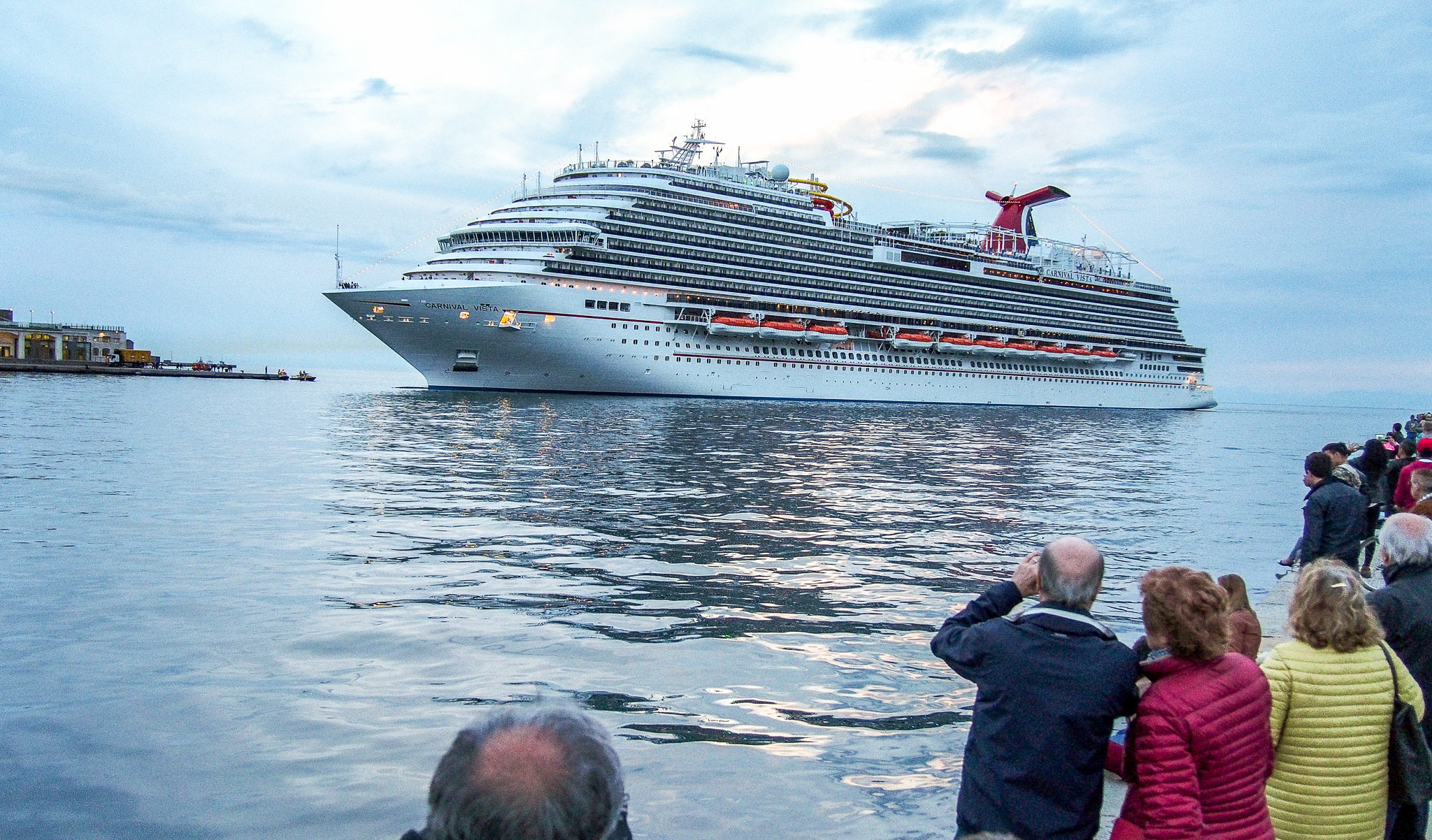 TRIESTE NAVI